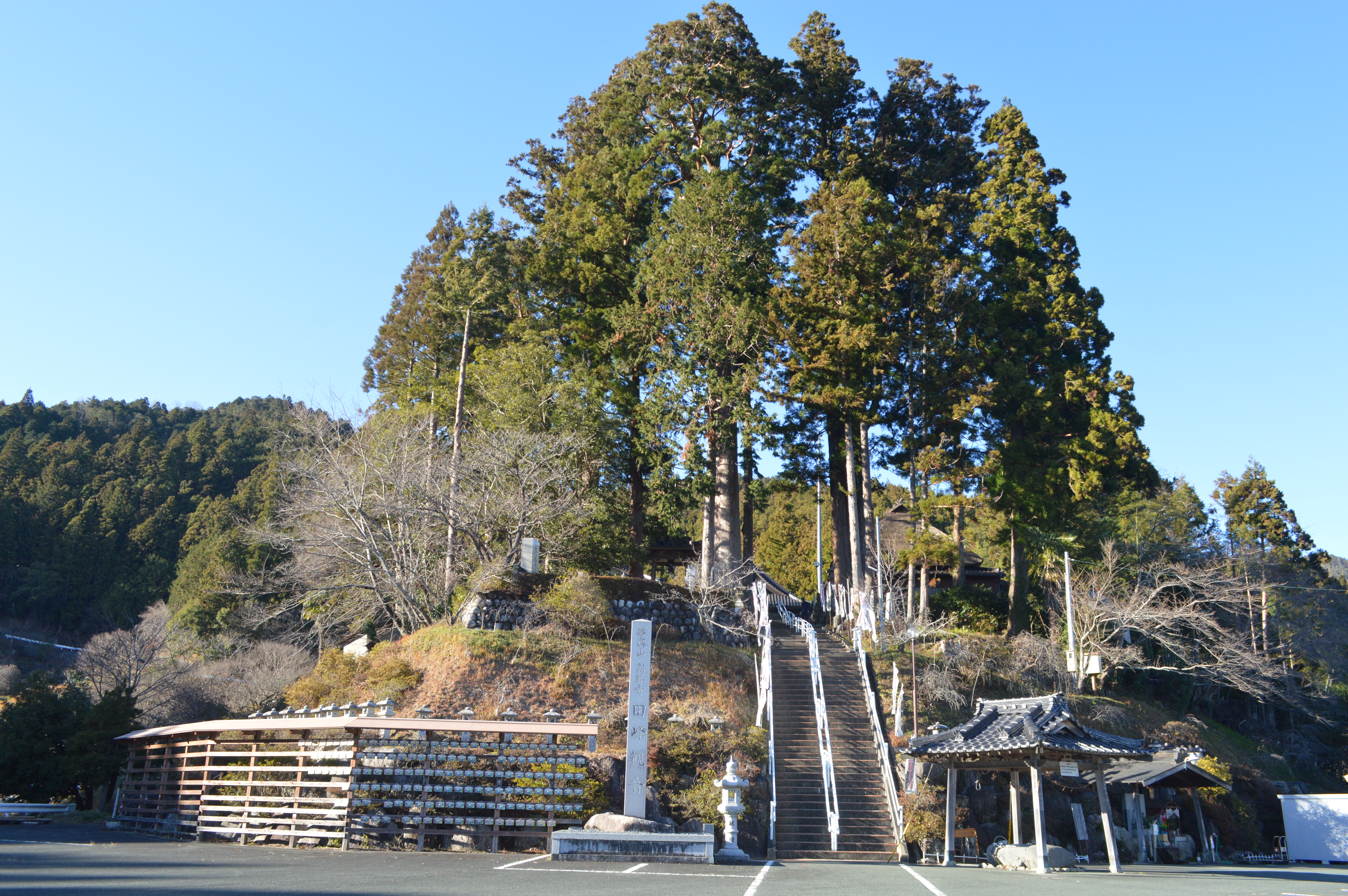 愛知県北設楽郡設楽町田峯にある田峯観音（田峰観音）。正式名は高勝寺。